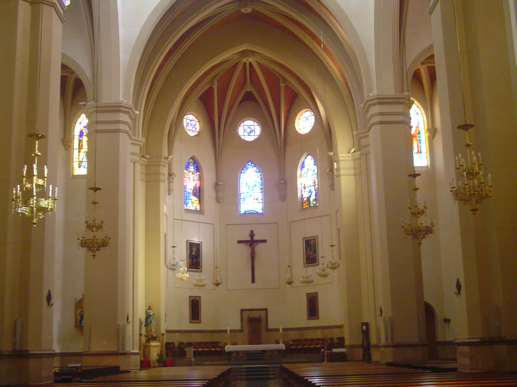 Altar Mayor de la Concatedral de Santa María, Castellón de la Plana (España)